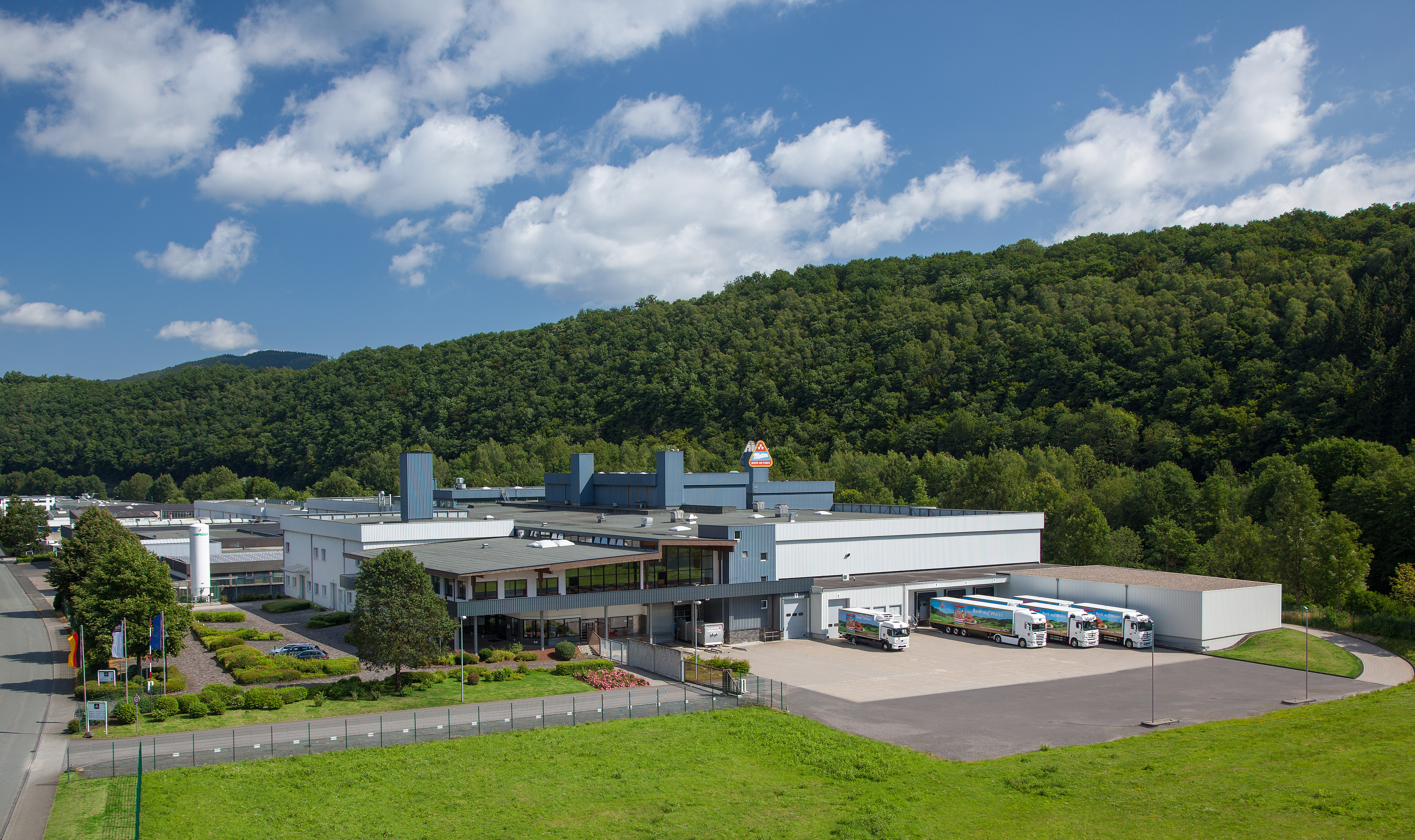 Das Produktionsgebäude von Metten Fleischwaren im Industriegebiet Frielentrop